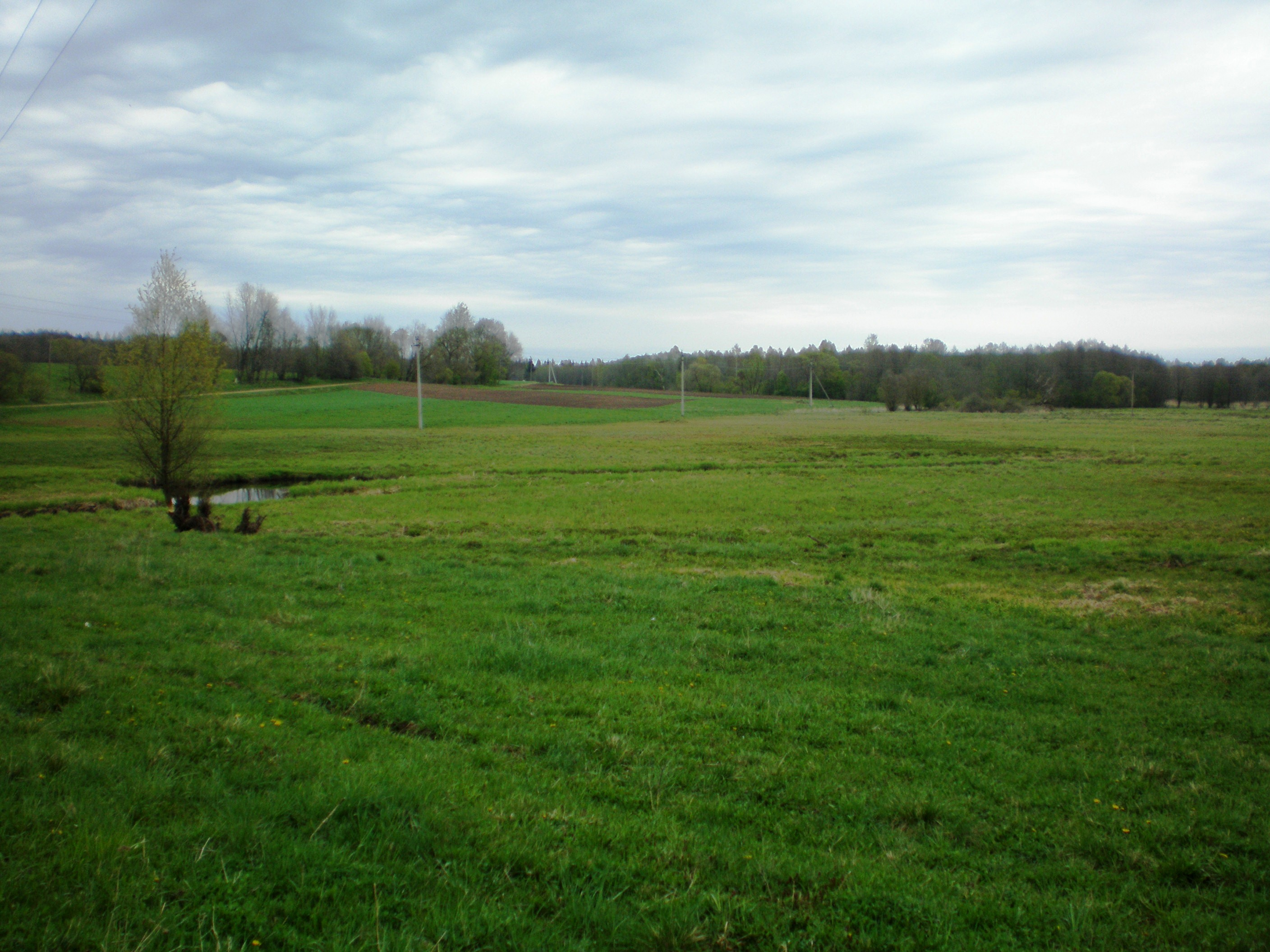 Virintos slėnis ties Naujasodžiu 2007.05.04 Foto: Hugo.arg